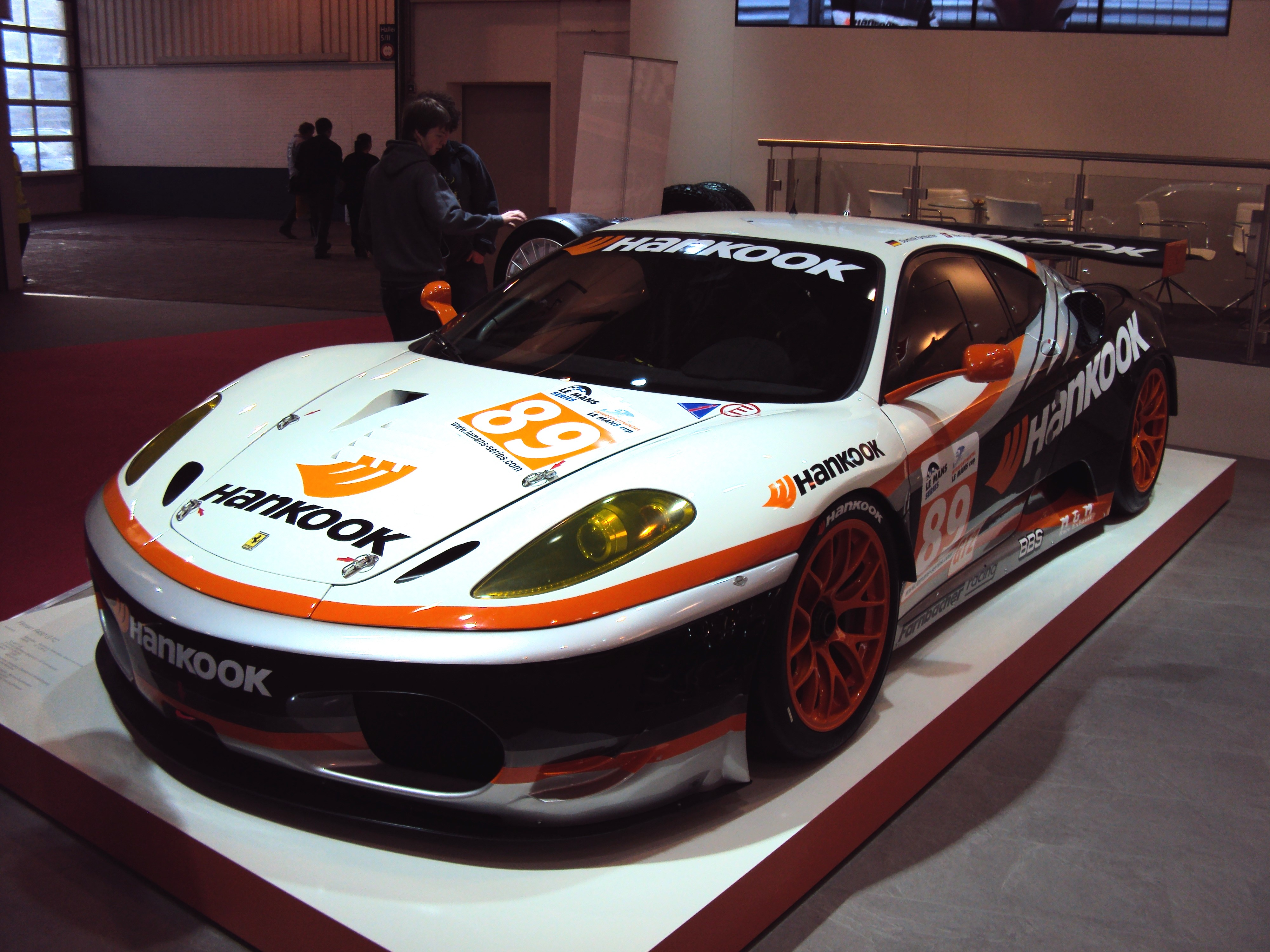 Ferrari F430 GTC von Farnbacher Racing, Essen Motor Show 2010